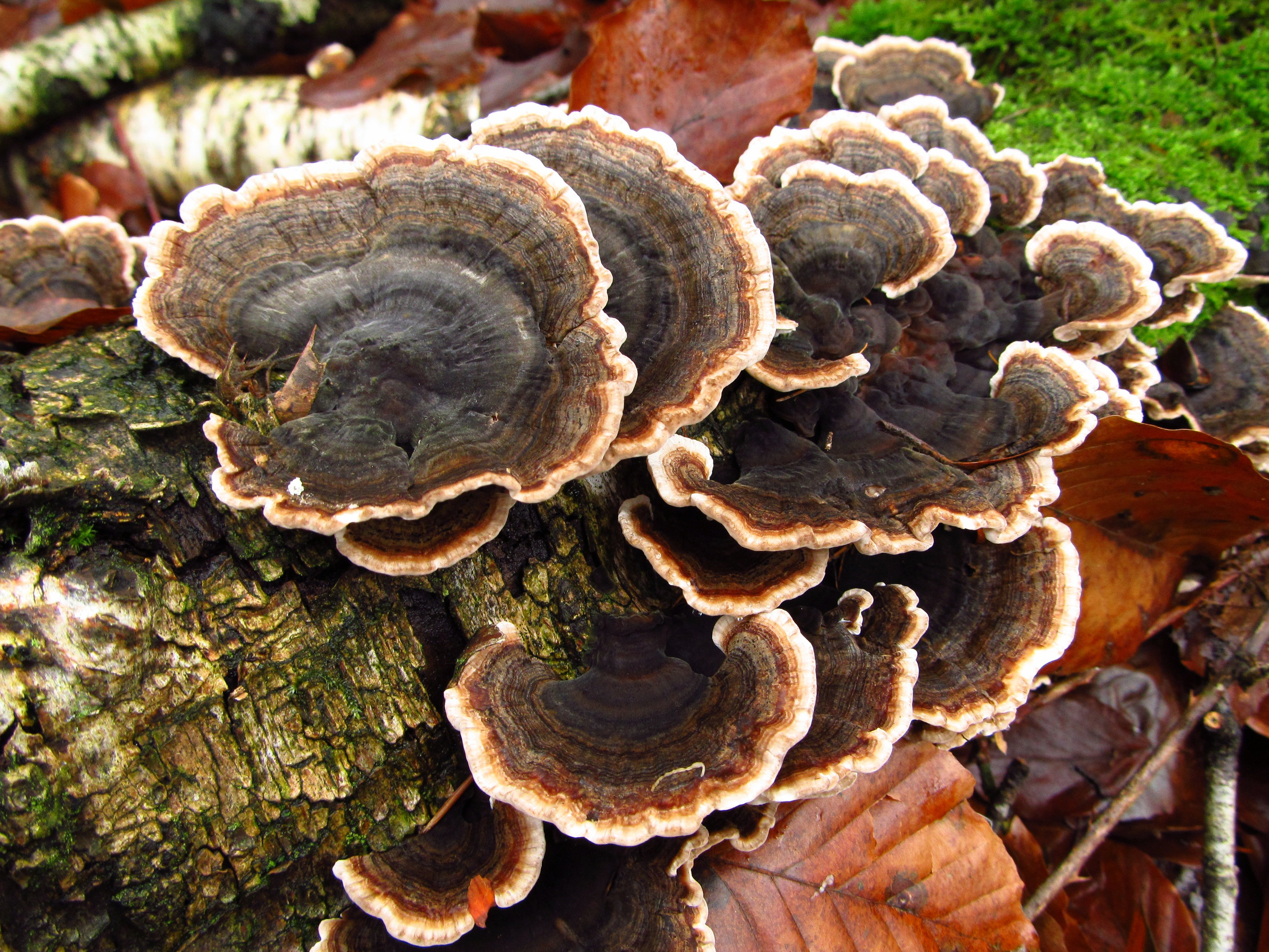 Die Schmetterlingstramete, auch Bunte Tramete oder Schmetterlingsporling (Trametes versicolor) ist eine häufige holzbewohnende Pilzart aus der Gattung der Echten Trameten. Ihr farbliches Erscheinungsbild ist sehr variabel. Die feinsamtige Oberseite der relativ dünnen Hüte ist immer bunt gezont, das Farbspektrum reicht von hell- bis dunkelbraun, auch olivfarbige, bläuliche und rötliche Töne können vorhanden sein. Die Zuwachszone ist weiß abgesetzt, der Hutrand flatterig-wellig, etwas gekerbt und scharf. Die Schmetterlingstramete ist ungenießbar, gilt jedoch als Heilpilz (Vitalpilz) in der traditionellen chinesischen Medizin. Photo: 10.01.2012, (hier mal an einer vermodernden Birke) im Hochwald bei Xanten-Marienbaum/ Kreis Wesel/ Niederrhein.